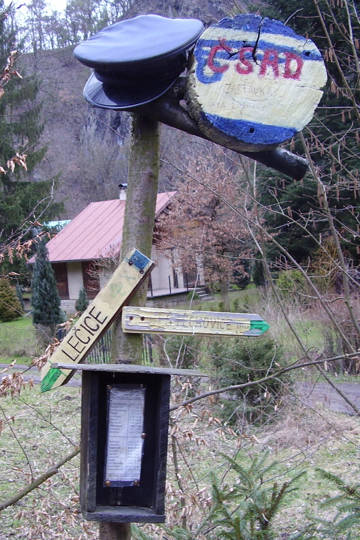 Rozcestník v podobě zastávkového sloupku ČSAD v osadě Dashwood, Bojanovice, okres Praha-západ.